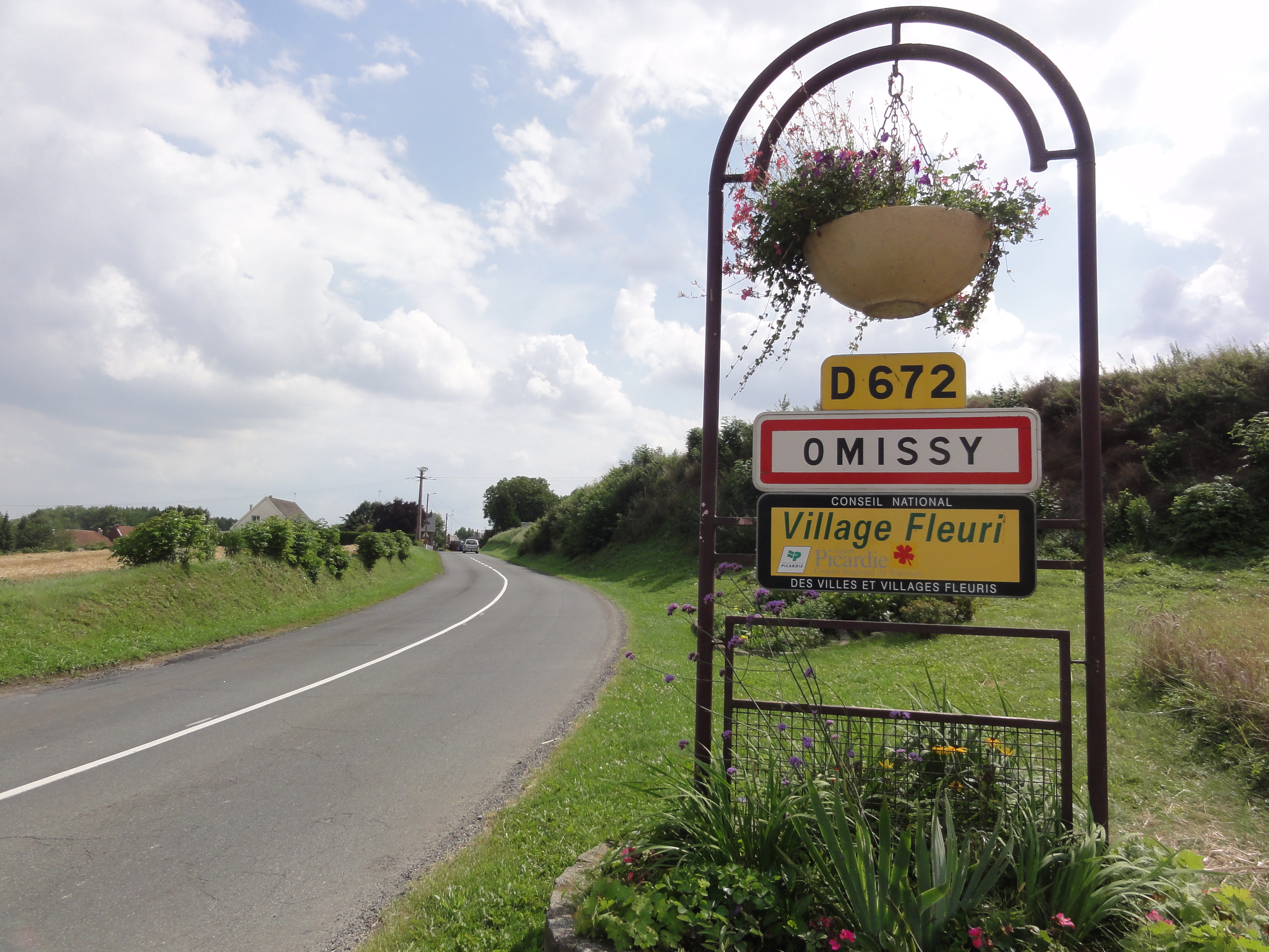 Omissy (Aisne) city limit sign